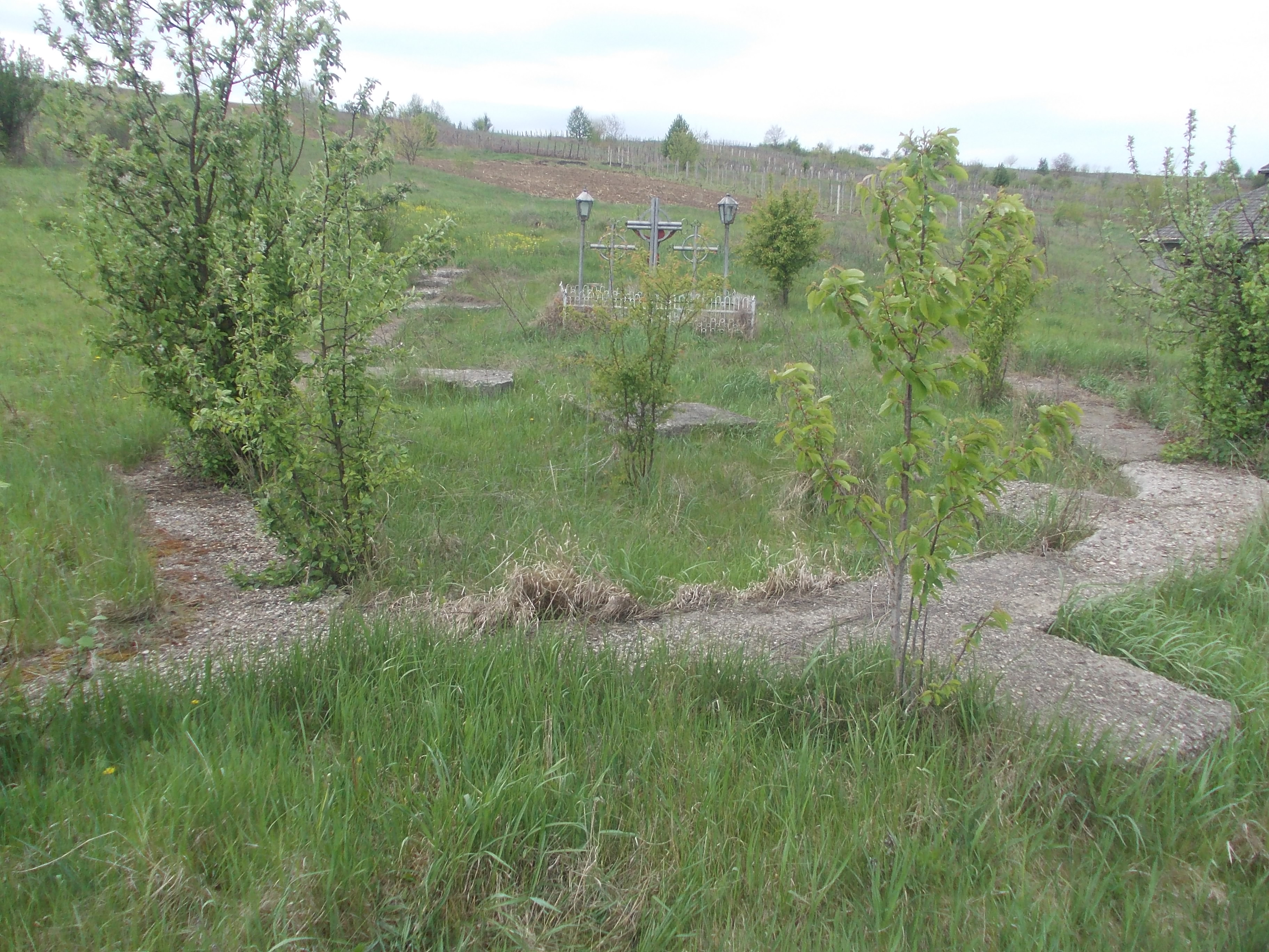 Ruinele bisericii catolice din Berindeşti, vechea vatră a satului Săbăoani 01